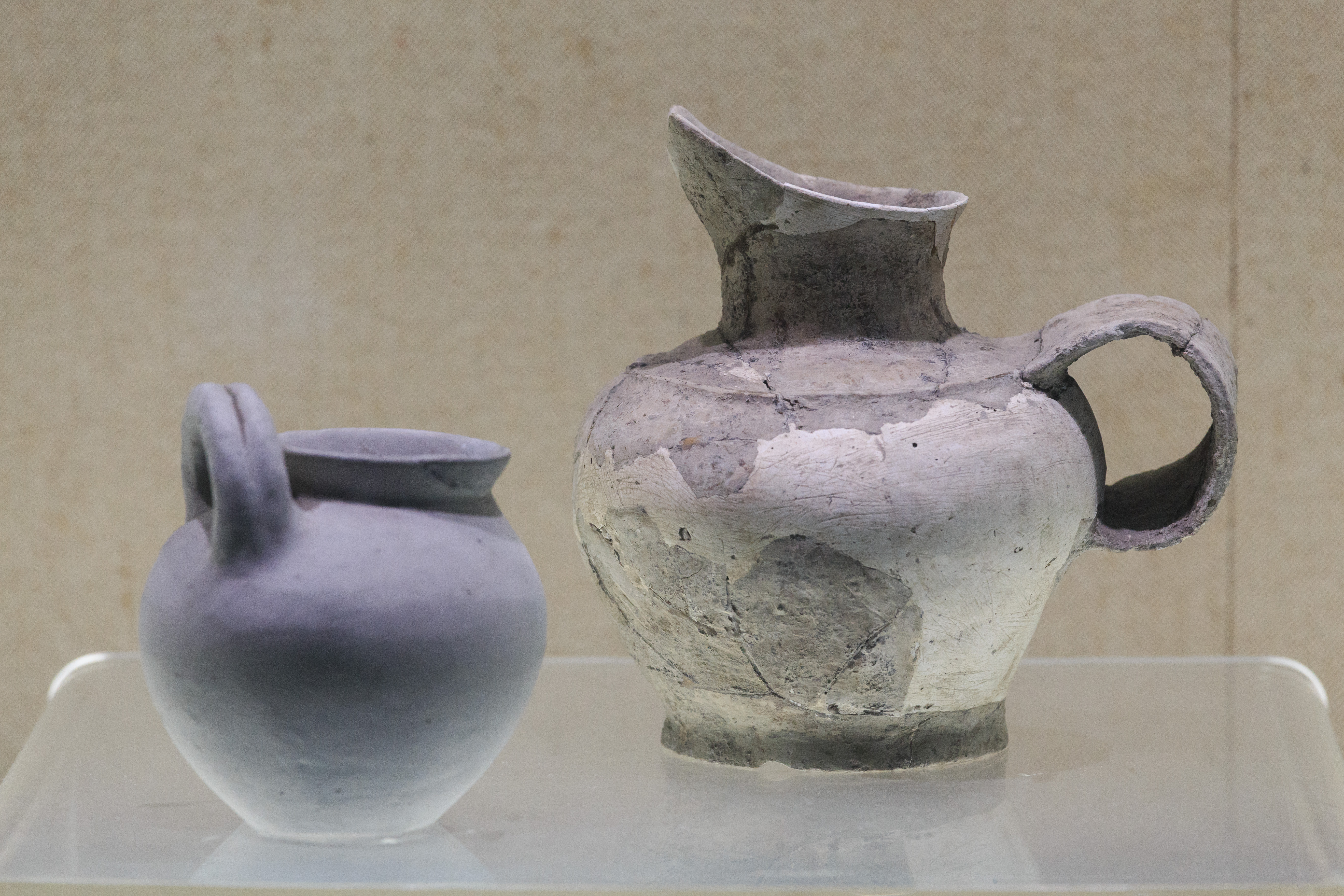 浙江省博物馆孤山馆区—— 左：灰陶侧把壶，右：灰陶宽把杯。良渚遗址出土